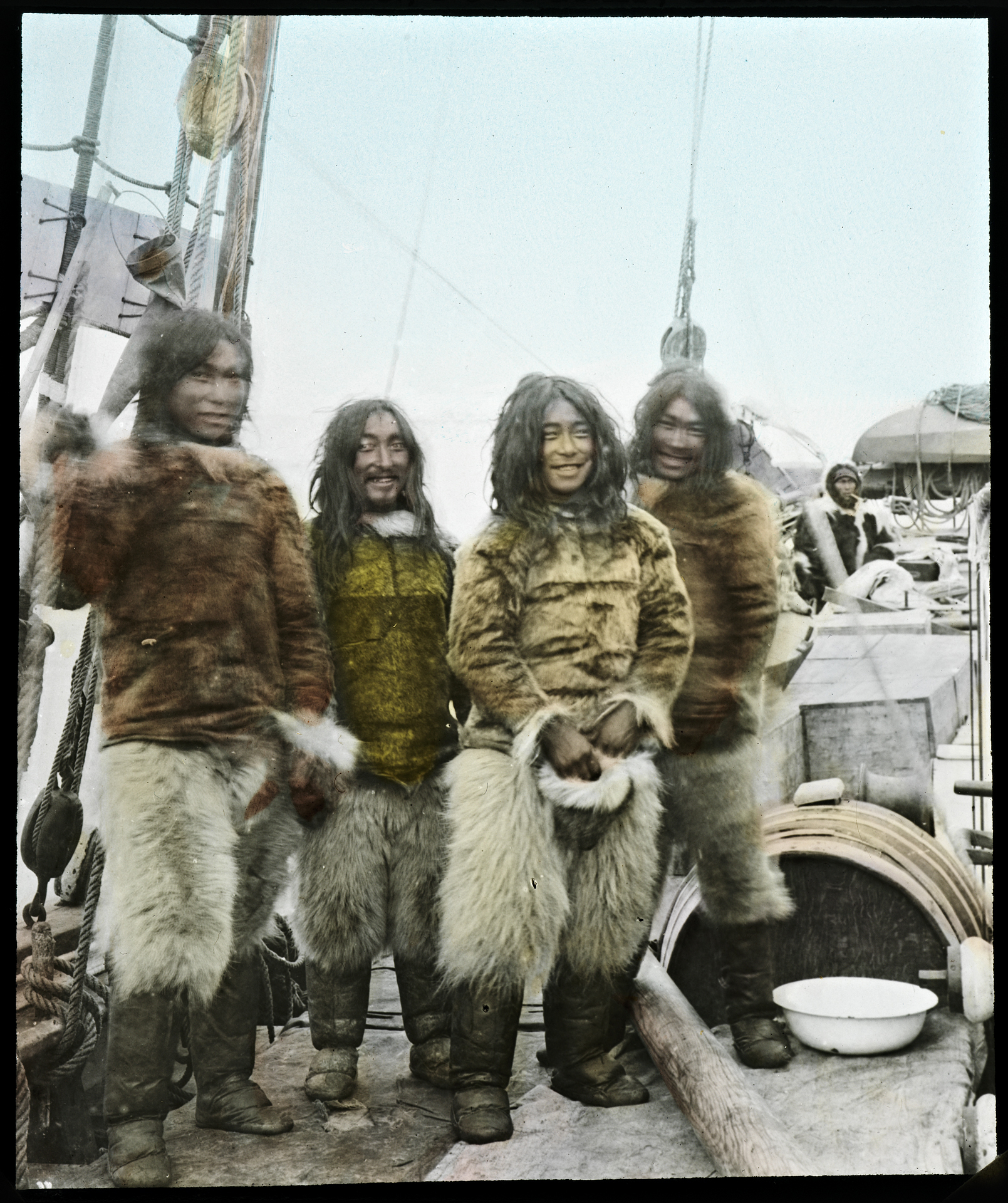 Tittel / Title: Fire inuiter fra Grønland ombord i "Gjøa" Motiv / Motif: Kolorert glasspositiv. Dato / Date: 1903 Fotograf / Photographer: ukjent / unknown Sted / Place: Grønland Eier / Owner Institution: Nasjonalbiblioteket / National Library of Norway Lenke / Link: Bildesignatur / Image Number: bldsa_NPRA0154